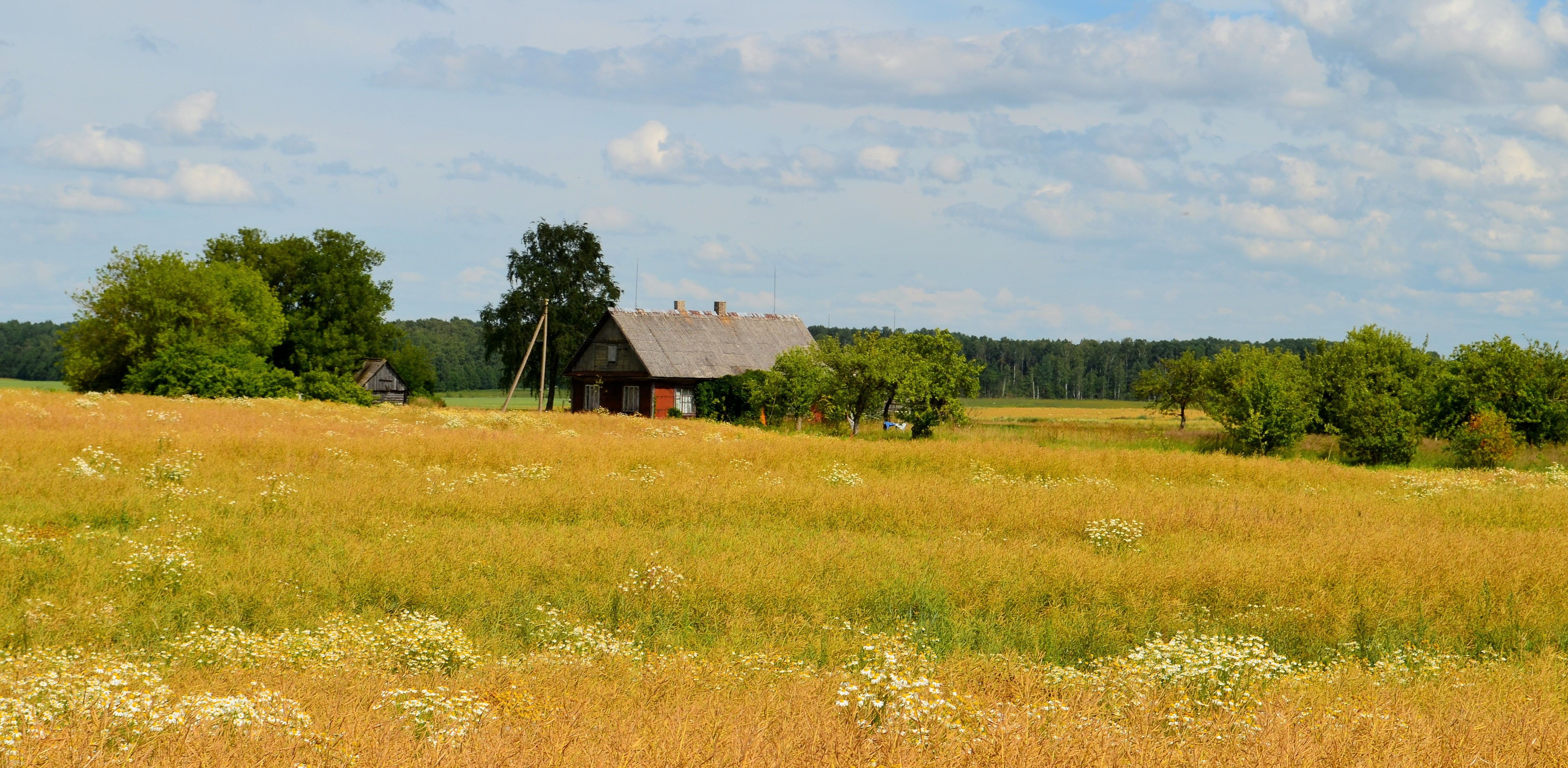 Belazariškiai, Ukmergės raj.